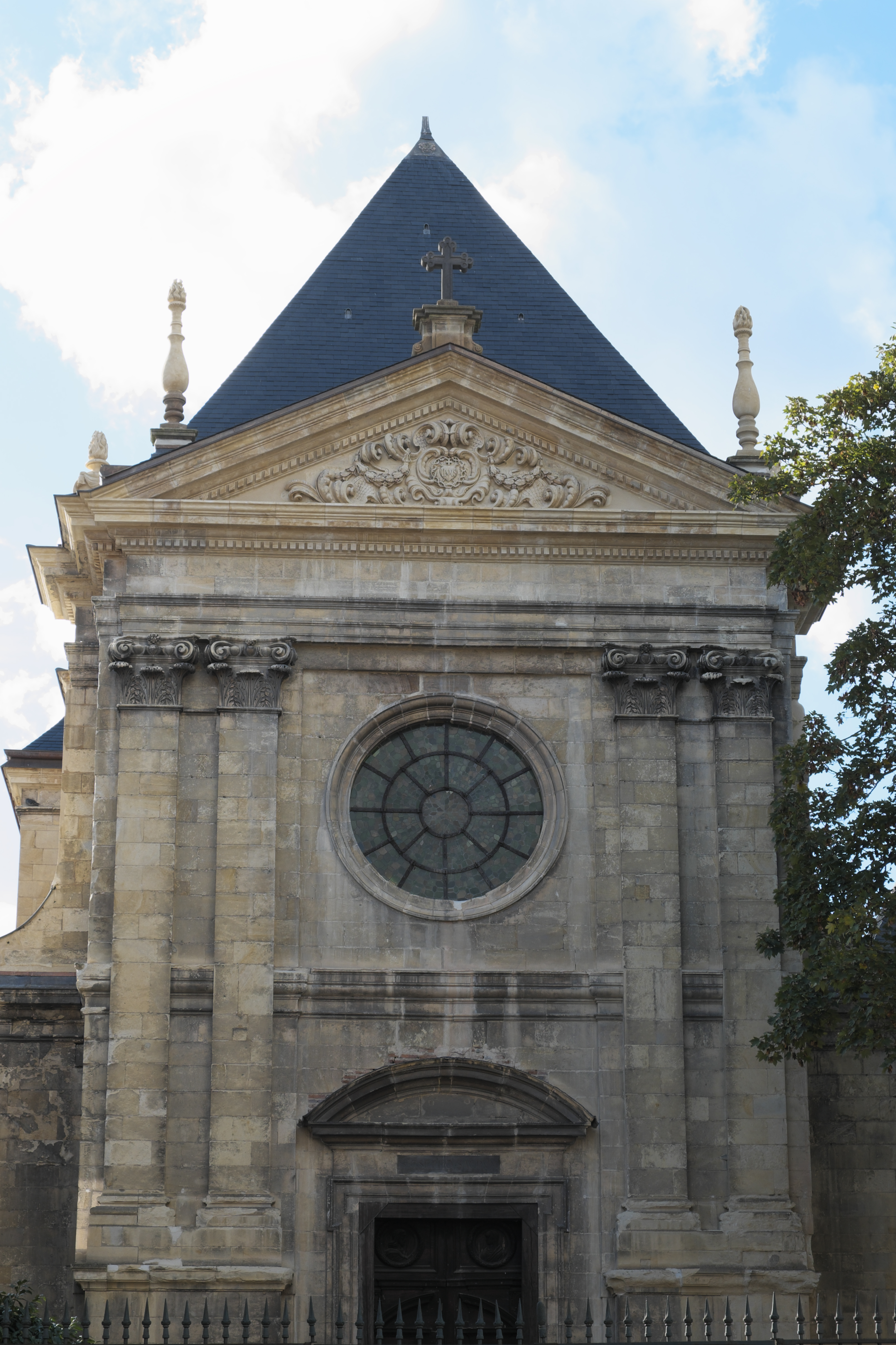 Kapelle Saint-Joseph, ehemalige Kapelle des Ordens von der Heimsuchung Mariens (Chapelle de la Visitation) in Moulins im Département Allier (Auvergne-Rhône-Alpes/Frankreich)